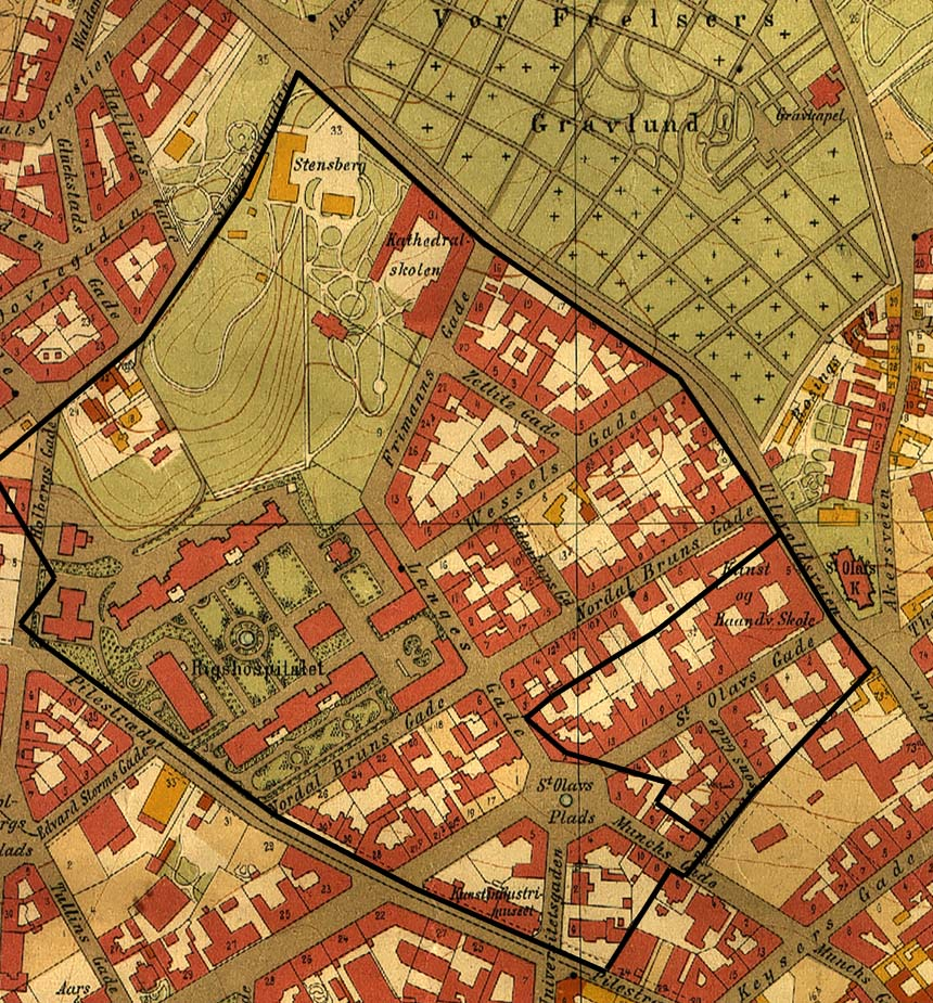 Map of Meyerløkka in Oslo 1902